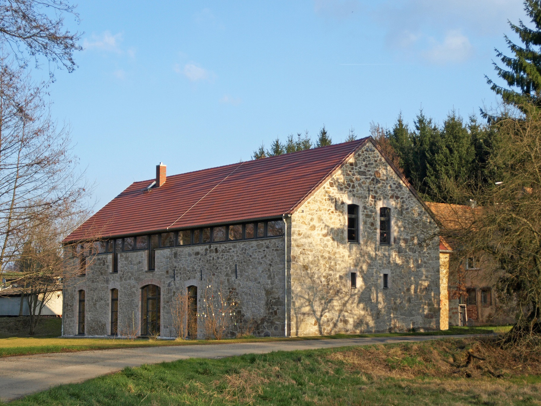 ehemalige Wassermühle in Bellwitz